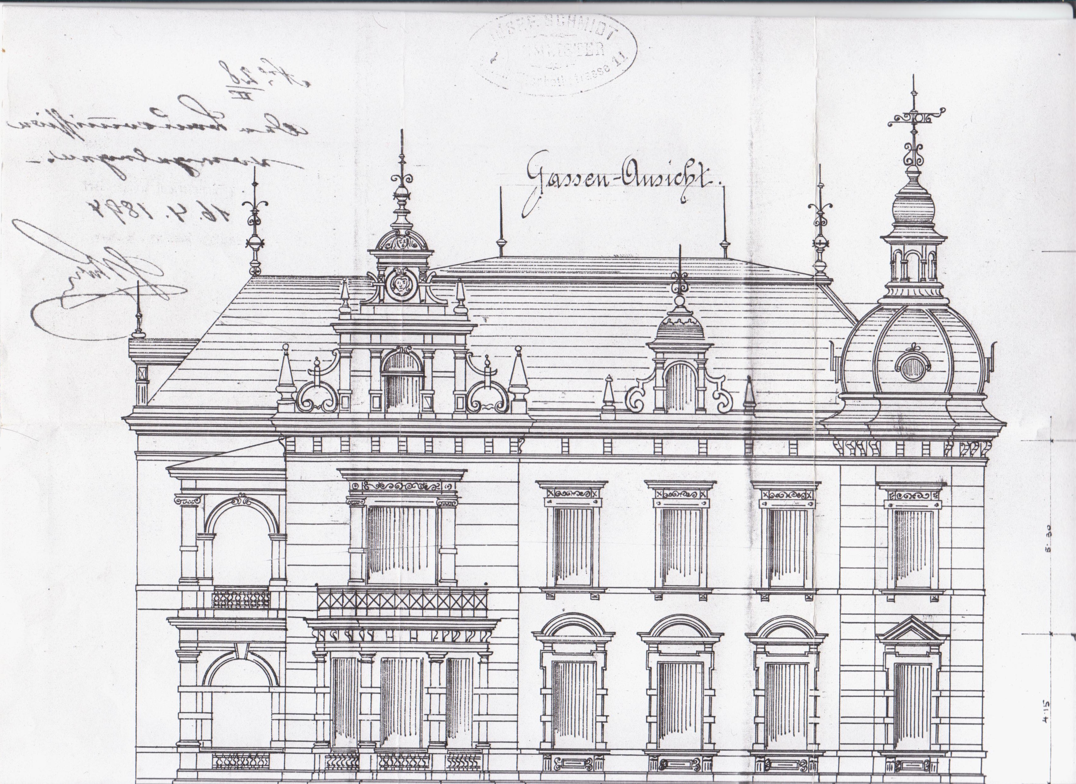 Front Plan Ansicht